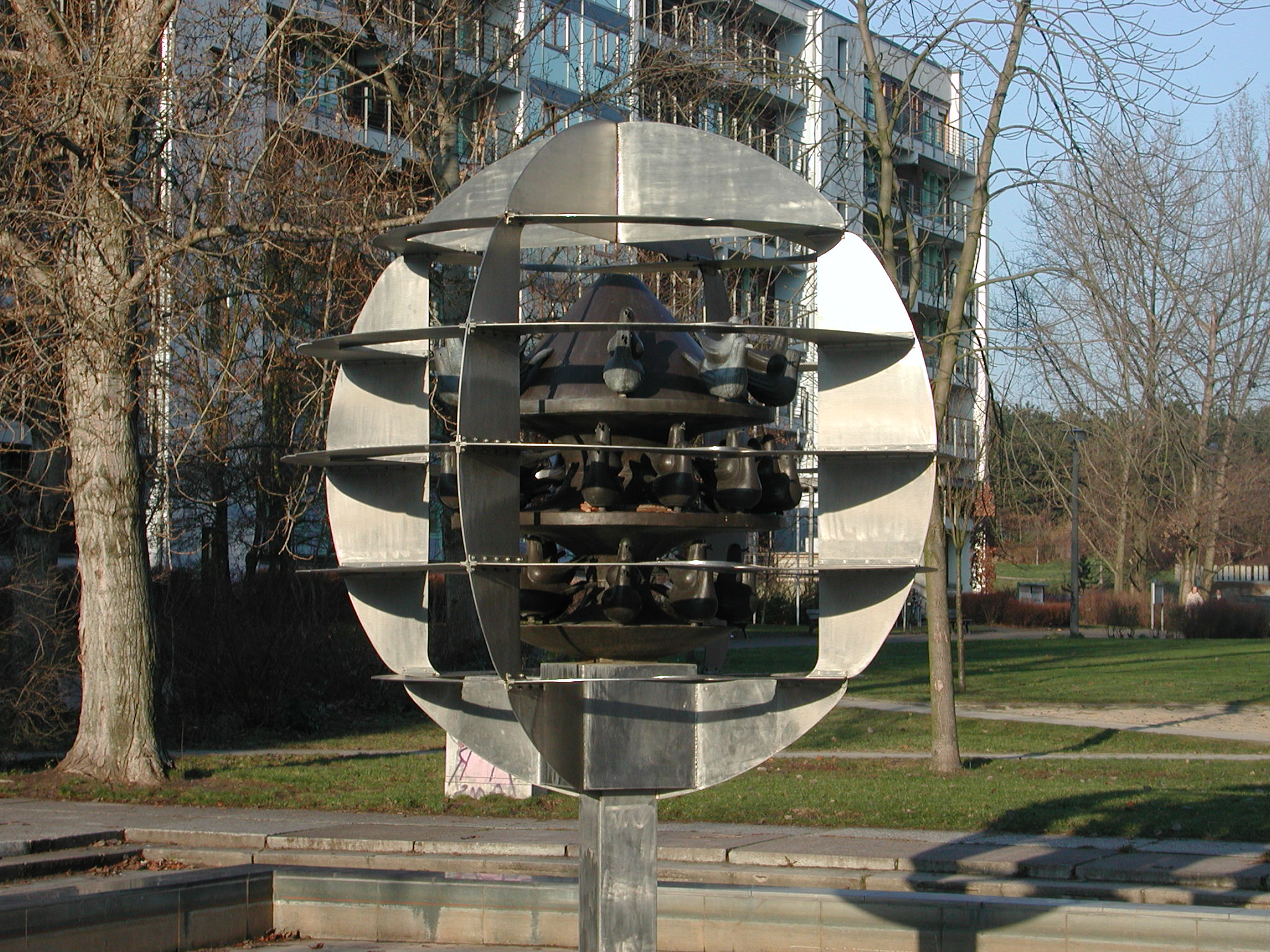 Berlin-Fennpfuhl, Vogelbrunnen